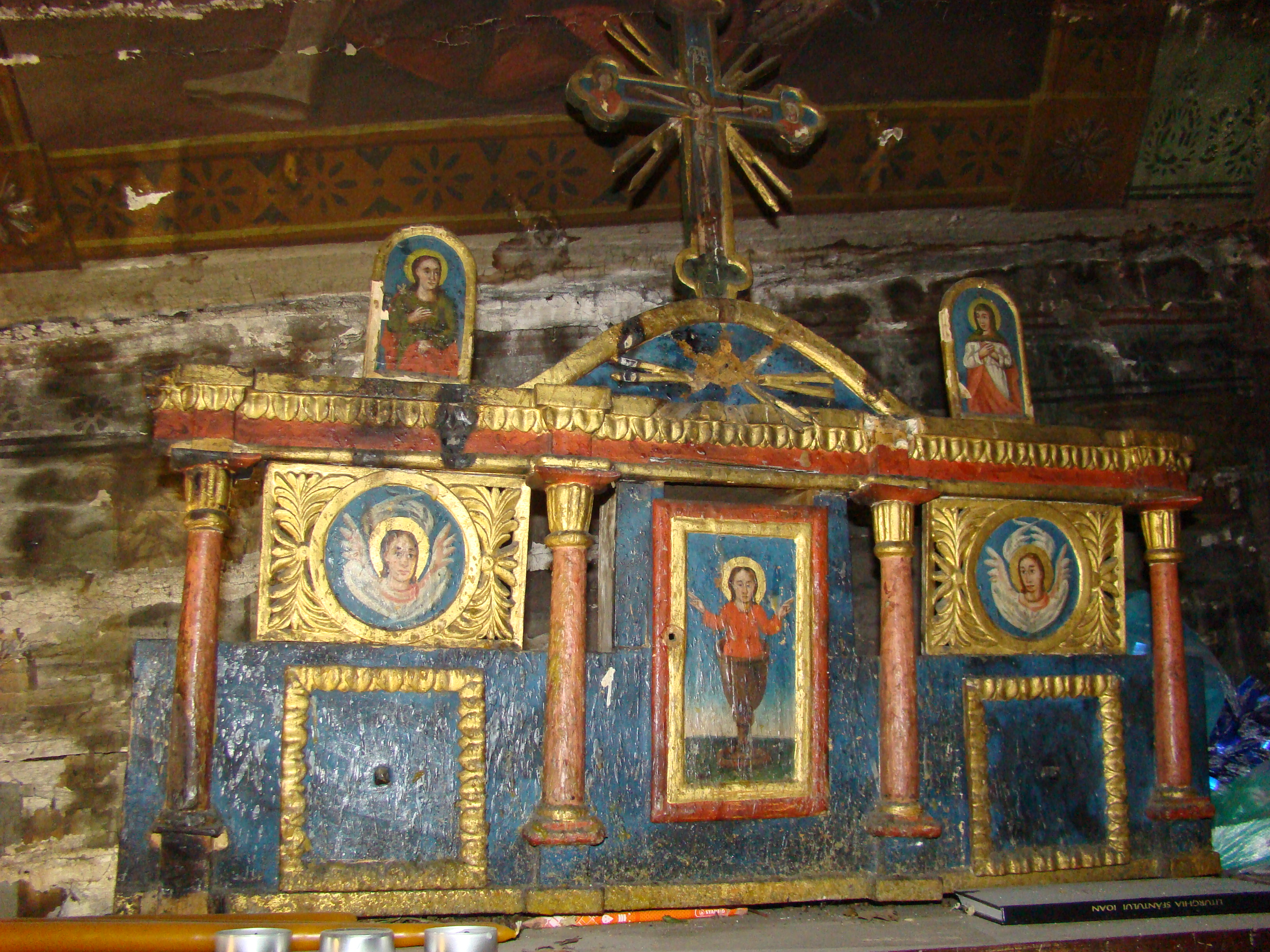 Biserica de lemn „Sfântul Mare Mucenic Gheorghe” din Ionești, județul Arad